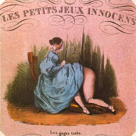 Les petits jeux innocens Les gages tirés